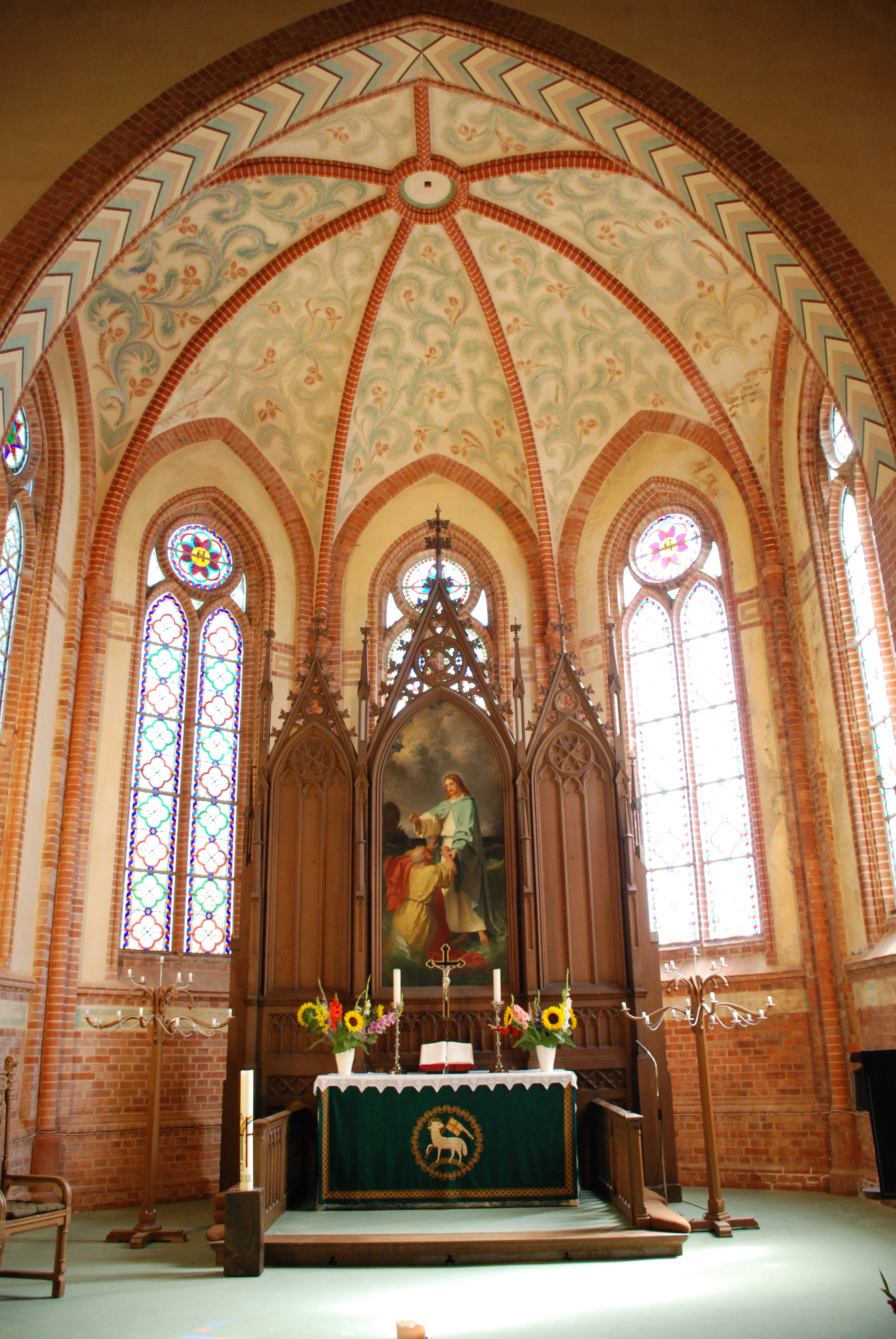 Apsis der Kirche in Wustrow